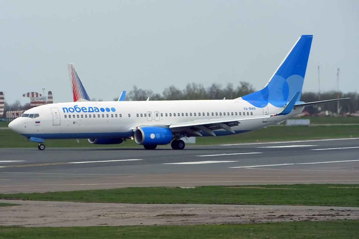 Pobeda, VQ-BWG, Boeing 737-8LJ